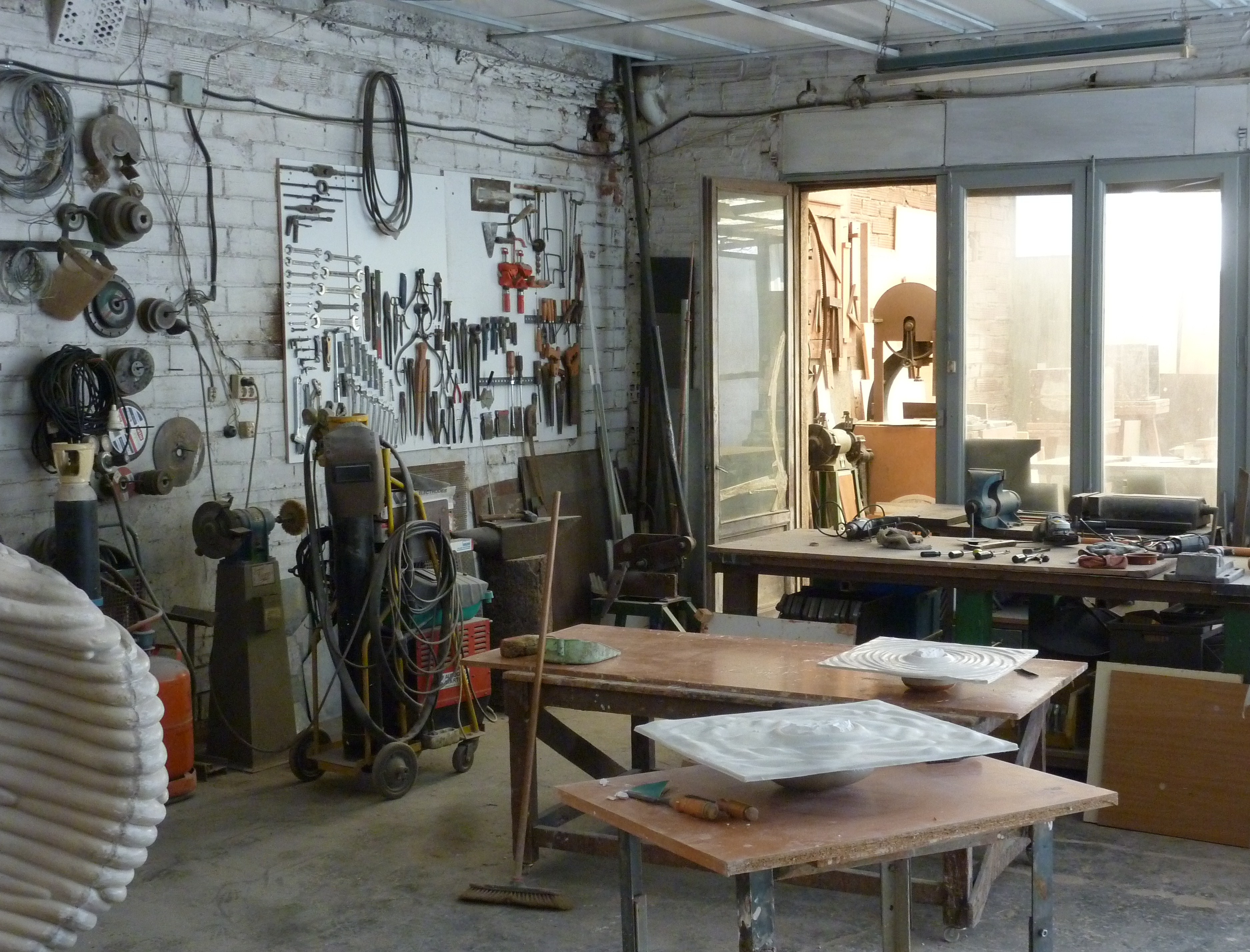 Atelier du sculpteur catalan Antoni Marquès à Sabadell (Catalogne) en 2014.